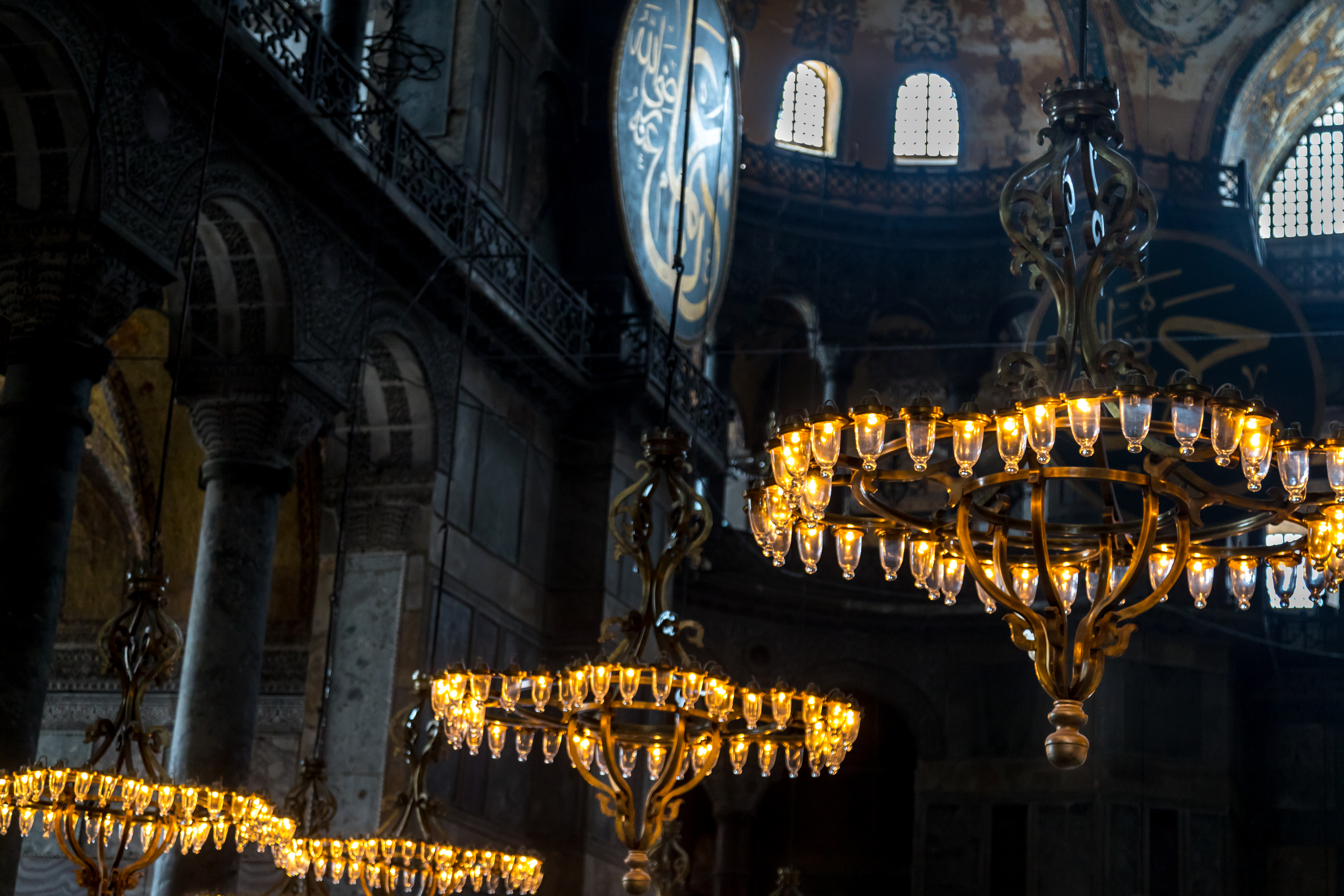 dettagli lampadari